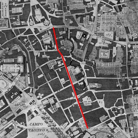 La via Alessandrina nella "Nuova Topografia di Roma" di G.B. Nolli (1748), evidenziata in rosso